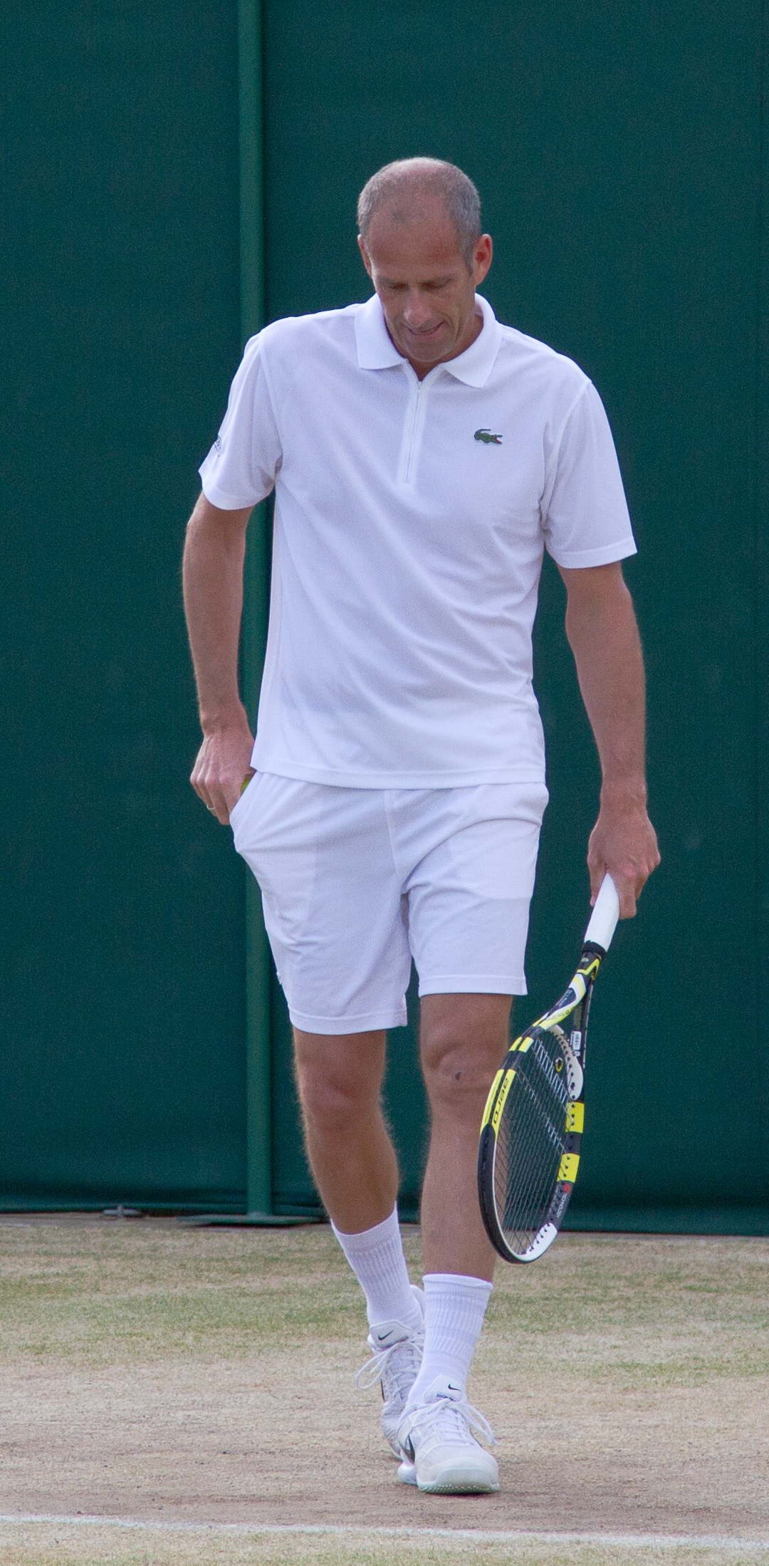 Forget, Wimbledon 2010